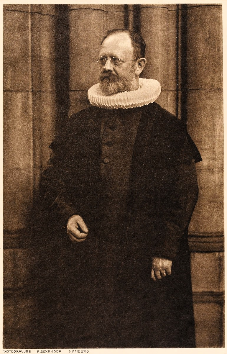 Eduard Rudolf Grimm (1848-1932), Pastor St. Nicolai, Senior